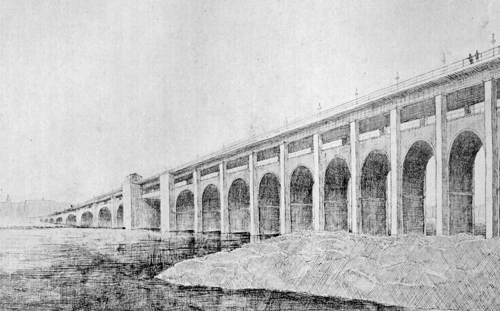 Årstabron med tilltänkta gatubron i betong ovanpå